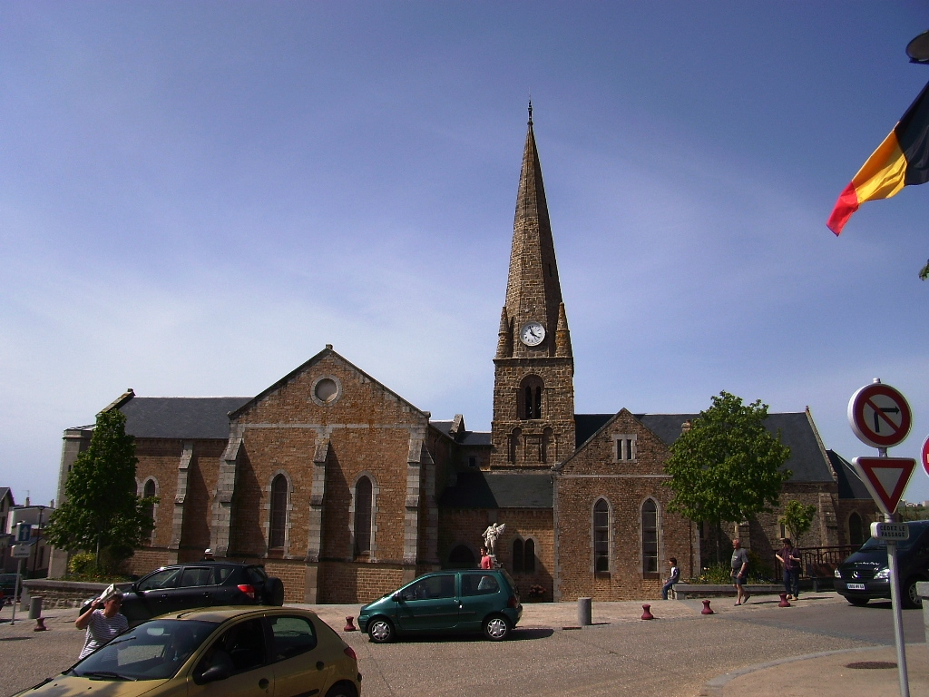 Eglise de Saint-Pair-sur-Mer (50)